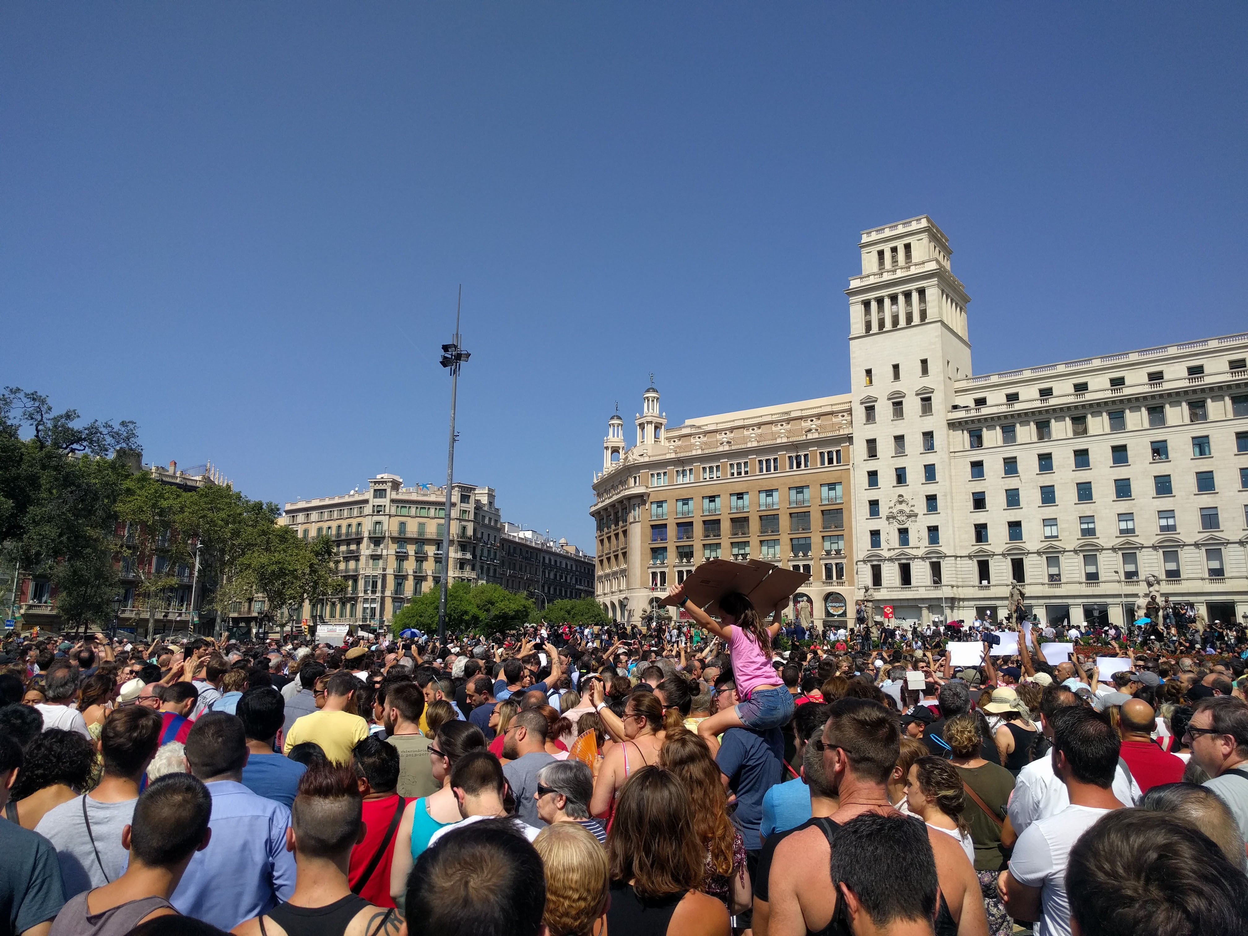 Assistents al minut de silenci a Plaça Catalunya del 18 d'agost de 2016.